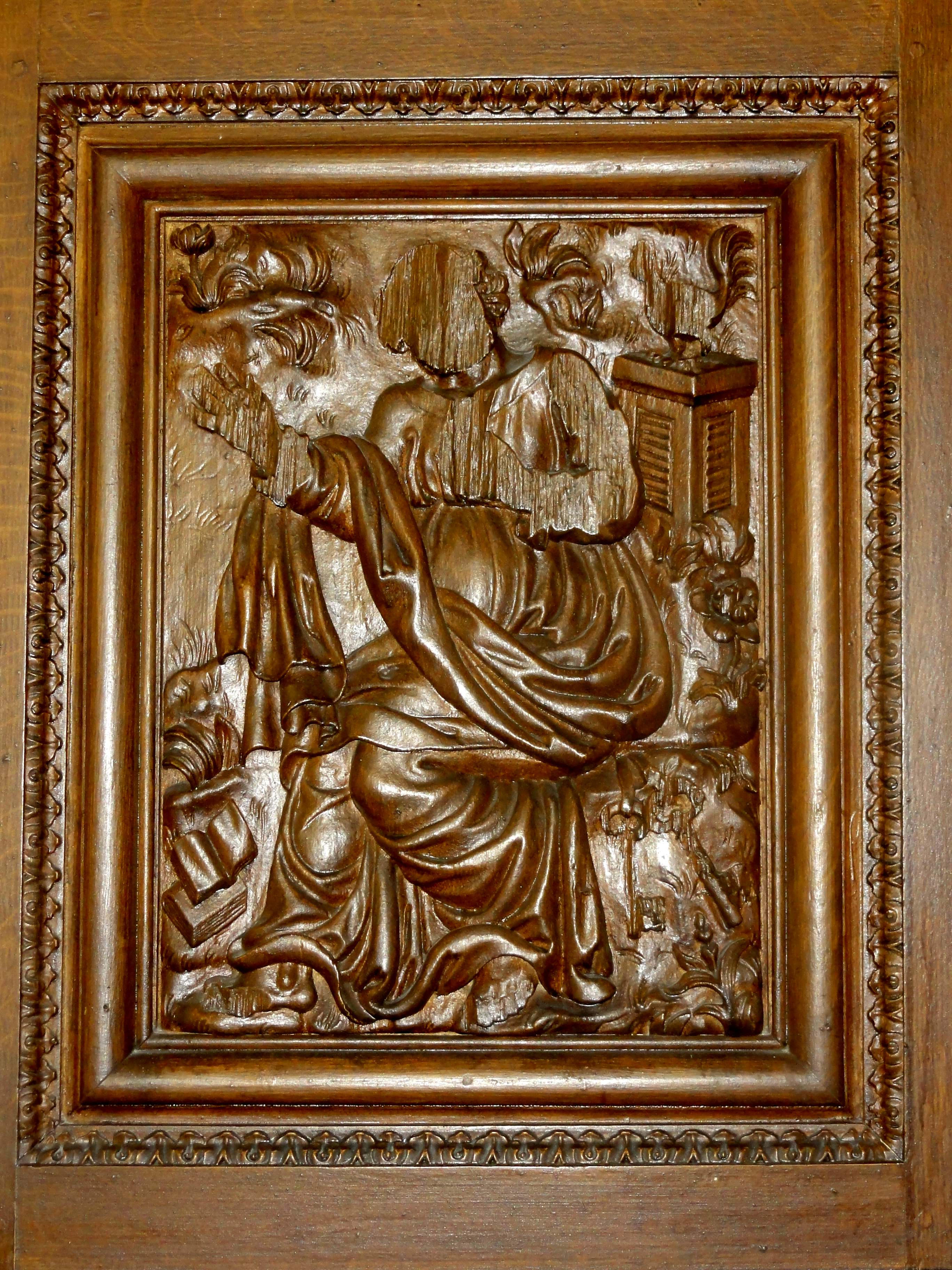 Chaire, bas-relief sur la cuve.